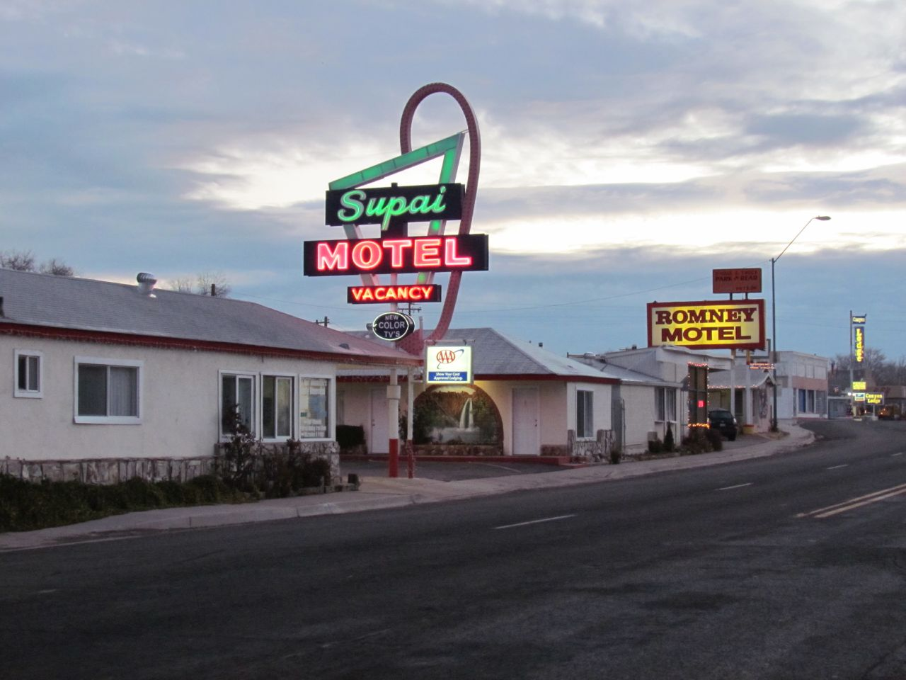 Seligman, Arizona.